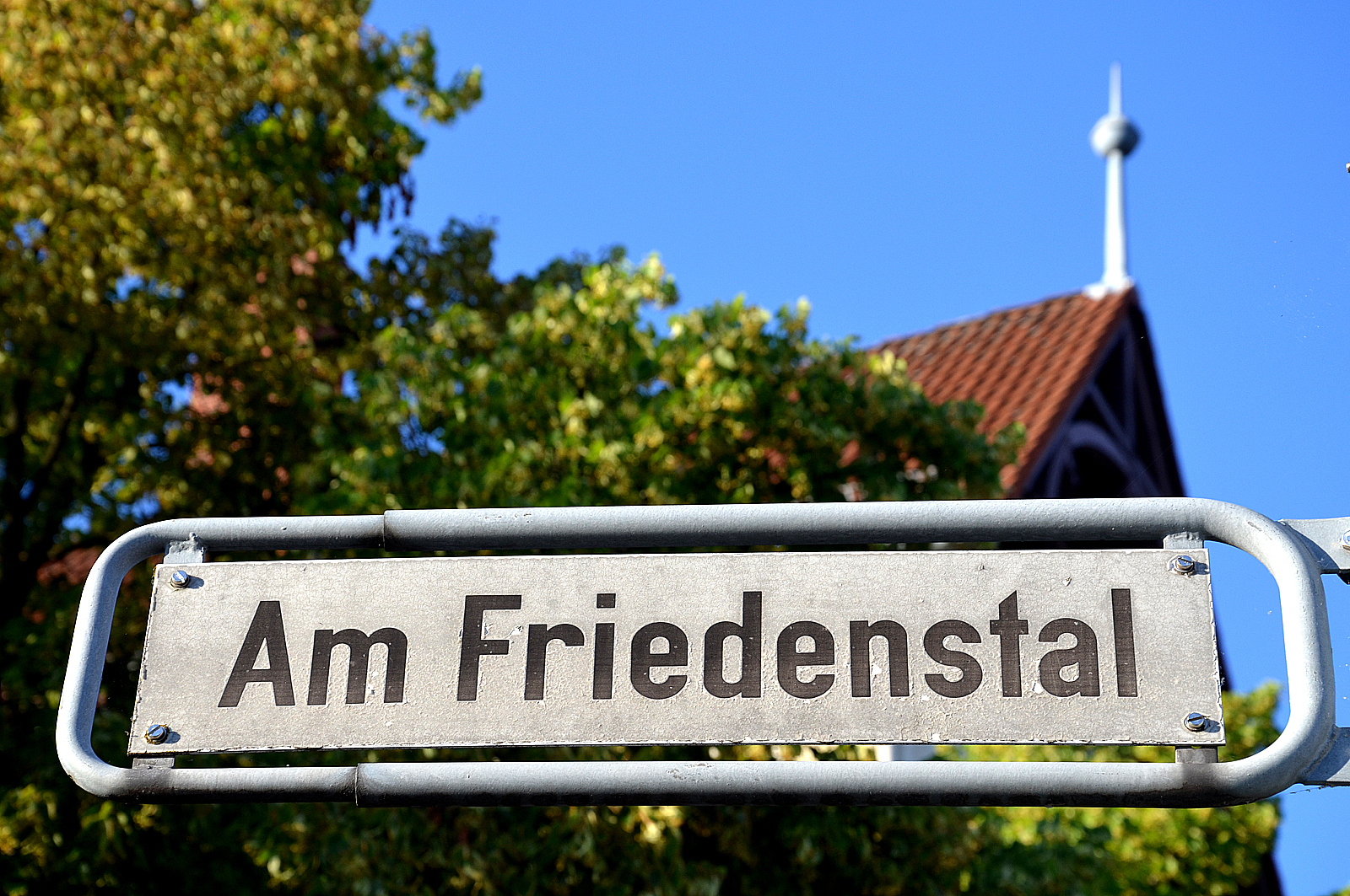 Der Straßenname Am Friedenstal in Hannover, Stadtteil Misburg-Nord nimmt Bezug auf das Kurhaus Friedenstal ...